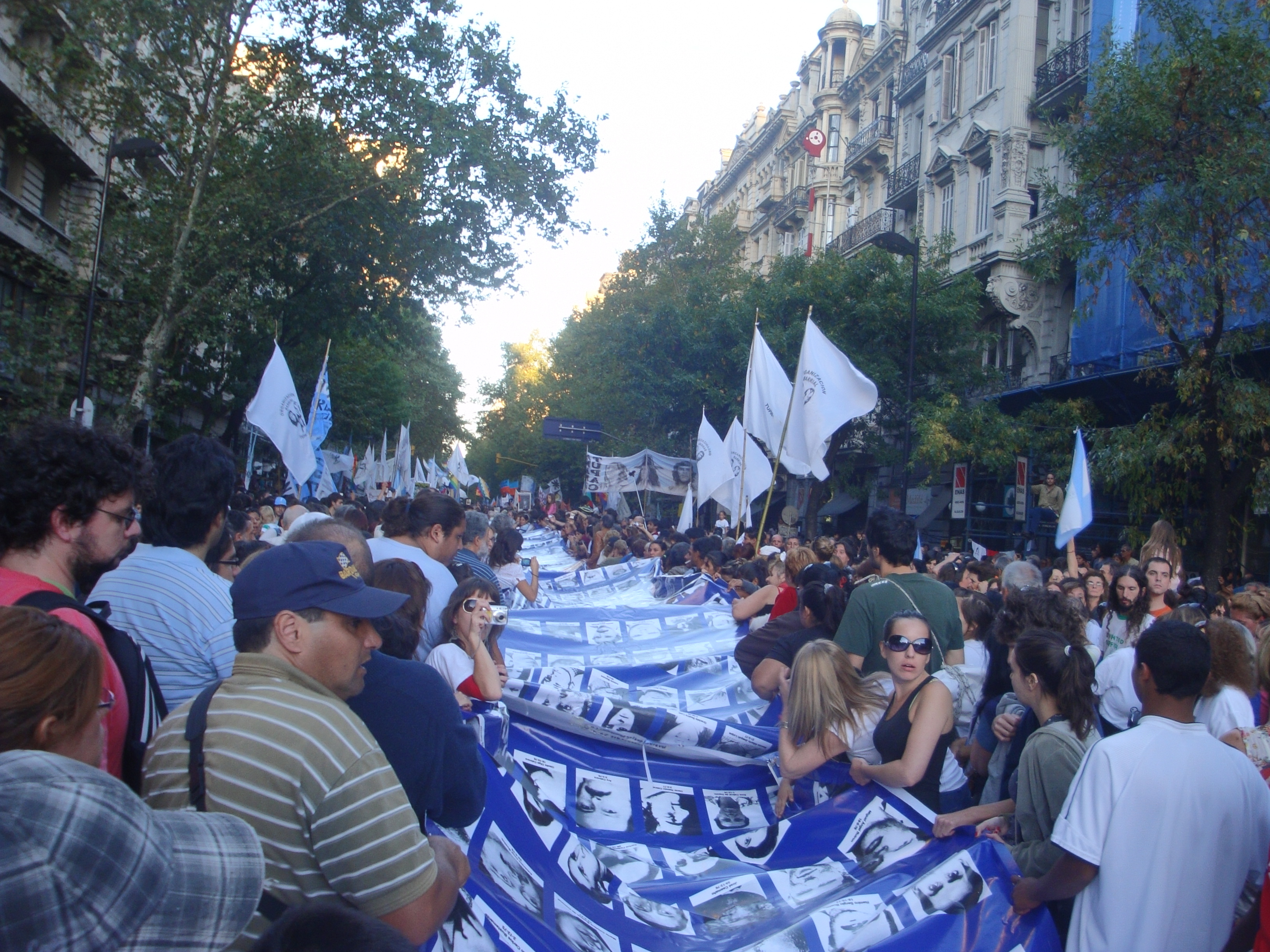 Bandera con los rostros de los Desaparecidos durante la manifestación en conmemoración al 35º aniversario del golpe de Estado en Argentina de 1976.